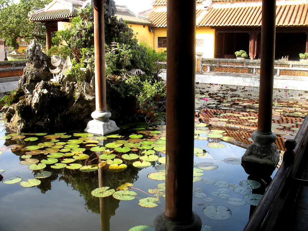 Phong cảnh chụp từ tạ Trường Du cung Diên Thọ